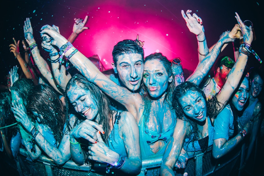 Eindruck eines NEONSPLASH Events in Brüssel